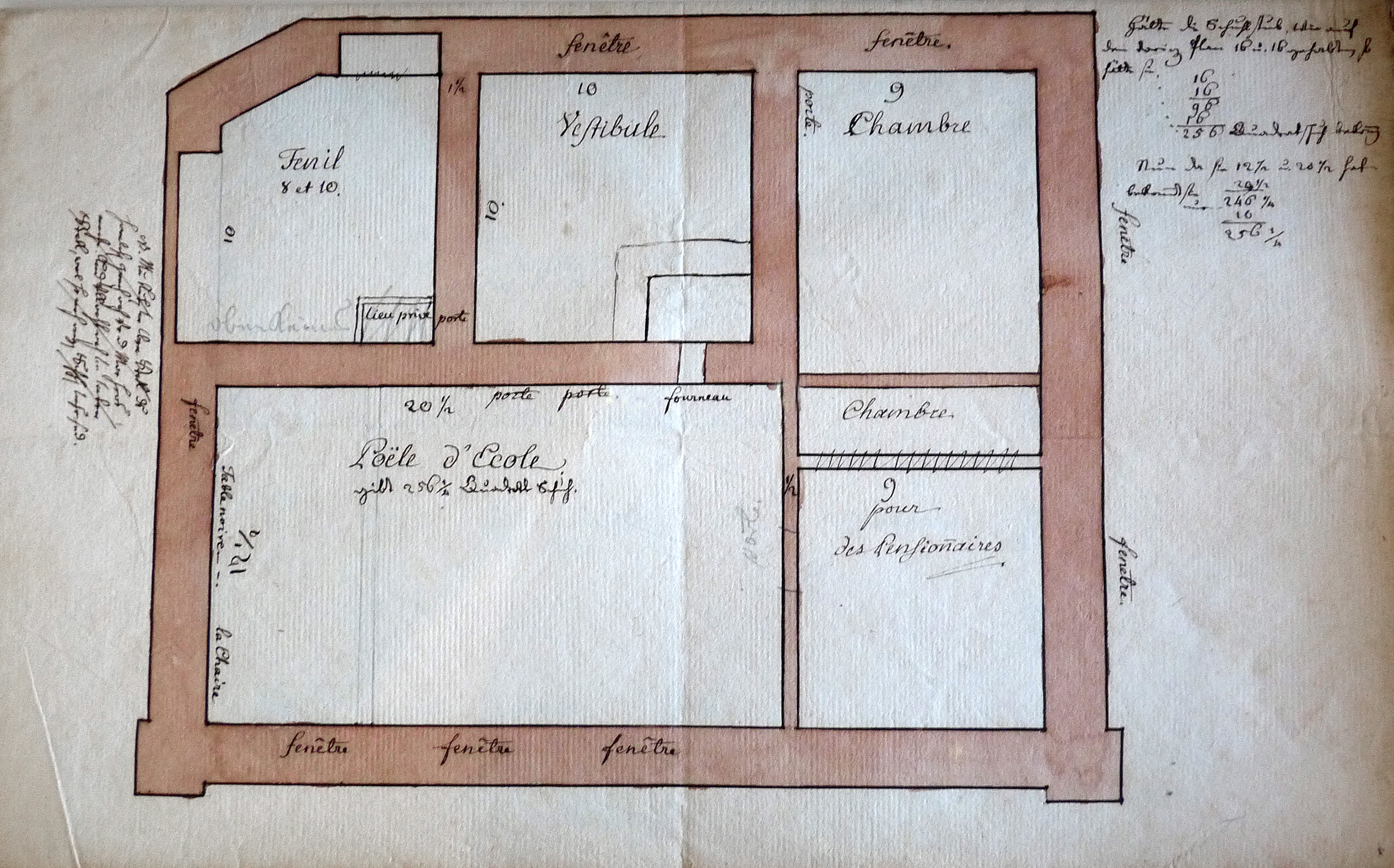 Plan de la maison-école de Belmont, dressé par le pasteur Jean-Frédéric Oberlin au 18e siècle. Musée Jean-Frédéric Oberlin à Waldersbach (Bas-Rhin).